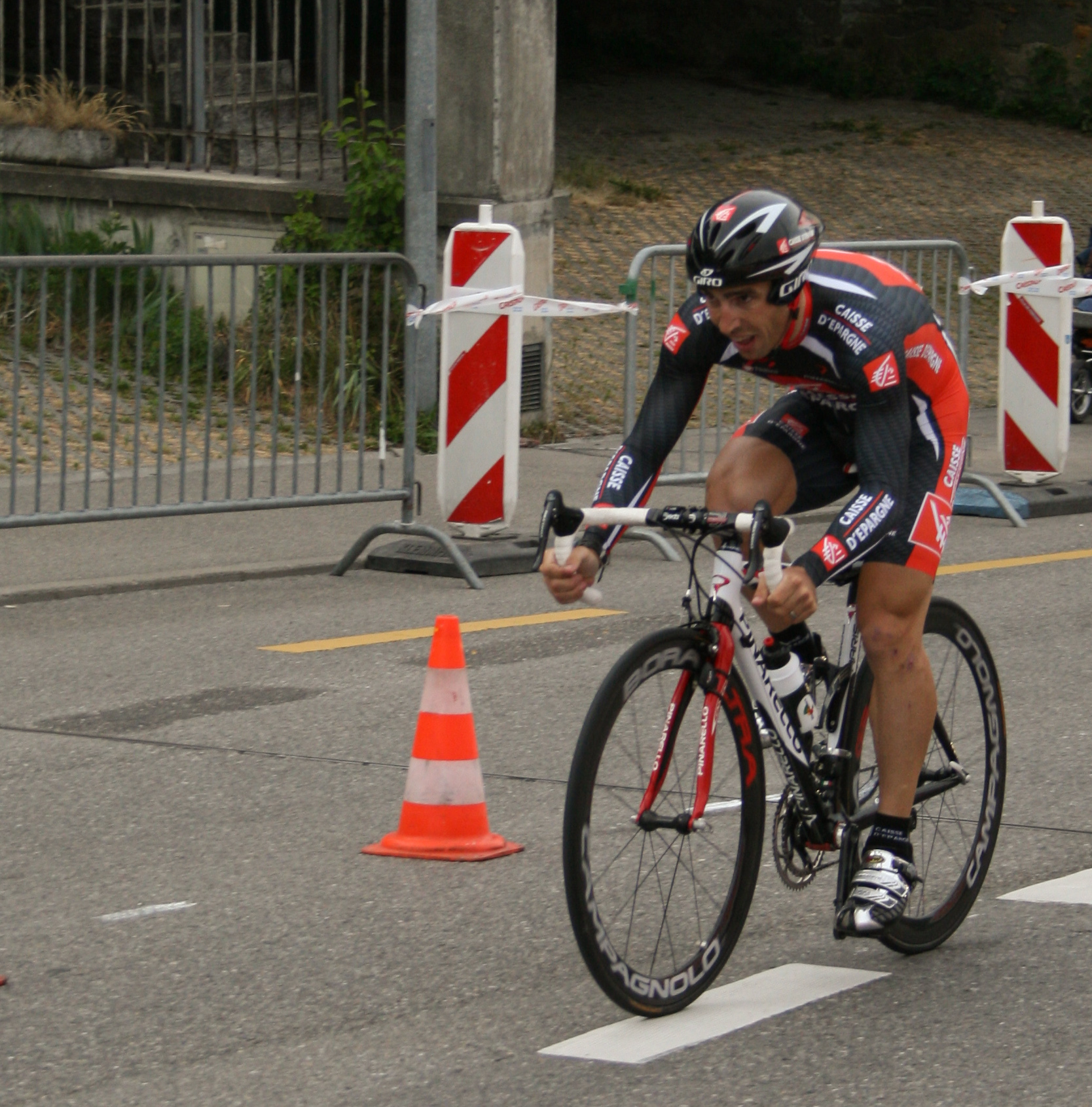 Vicente Reynes Mimo prologue du Tour de Romandie 2007